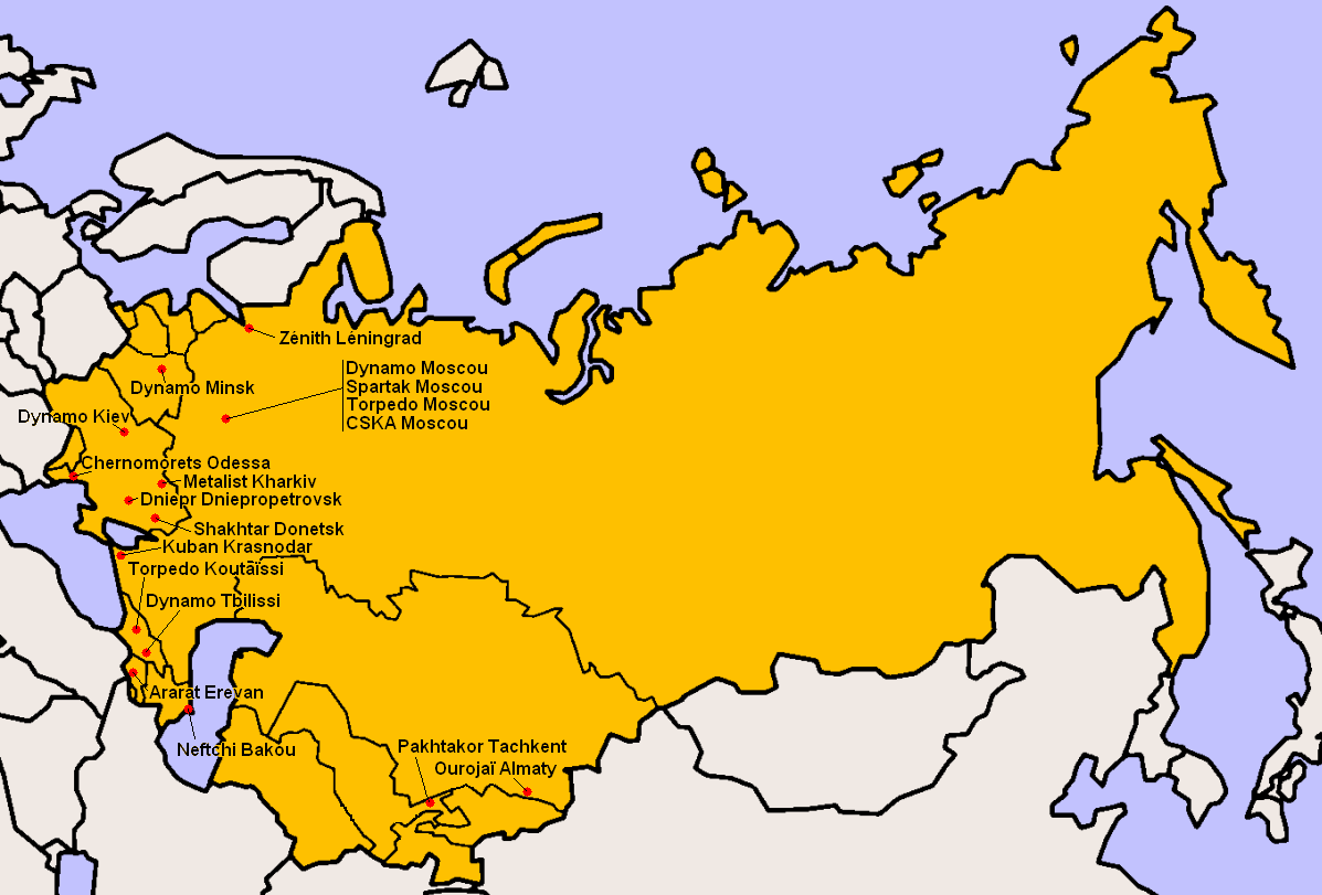 Clubs participants à la Division Supérieure 1982.